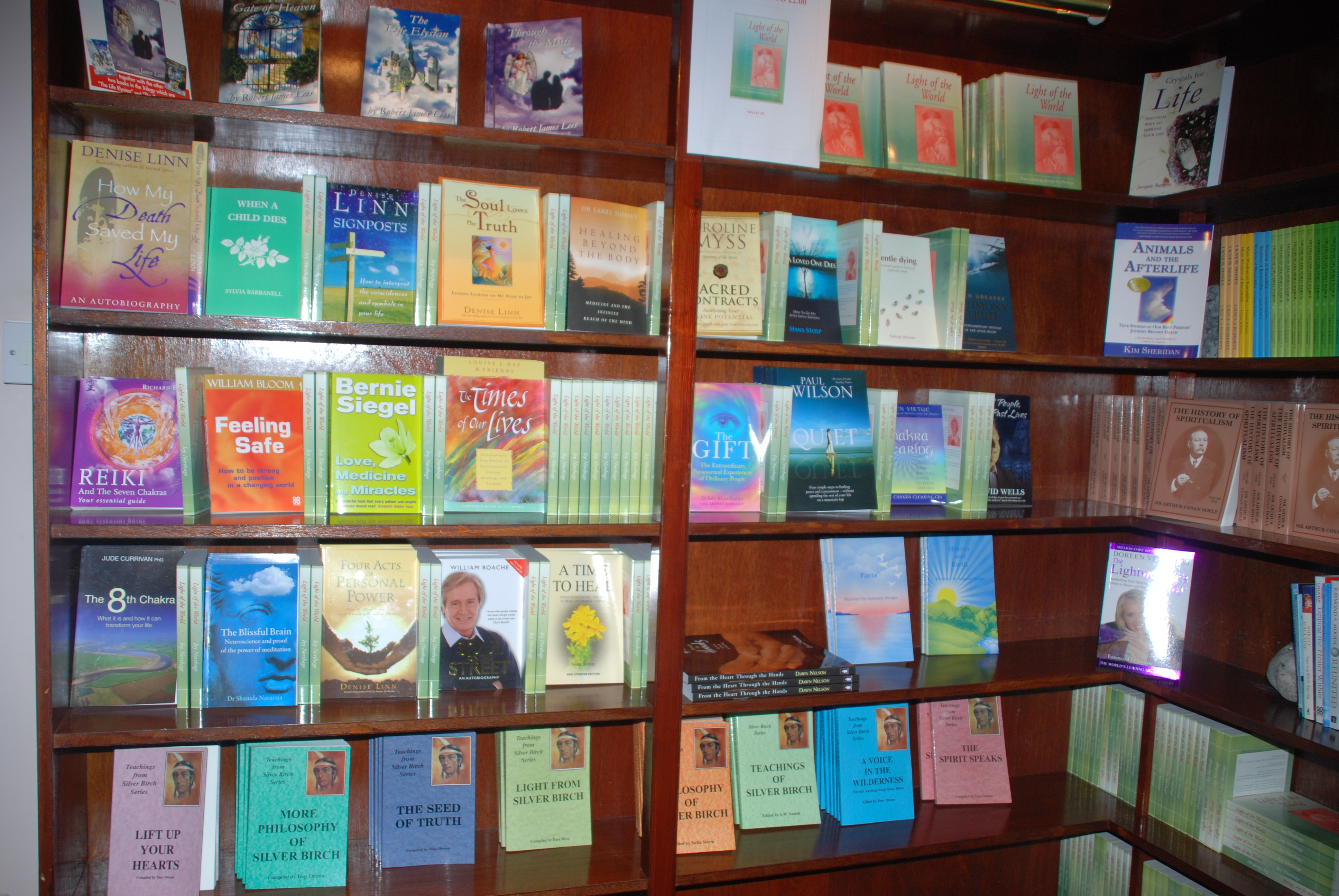 Quelques ouvrages composabt la bibliothèque de l'Association Spiritualiste de Grande Bretagne à Londres. Sir Arthut Conan Doyle y est tenu en très haute estime.